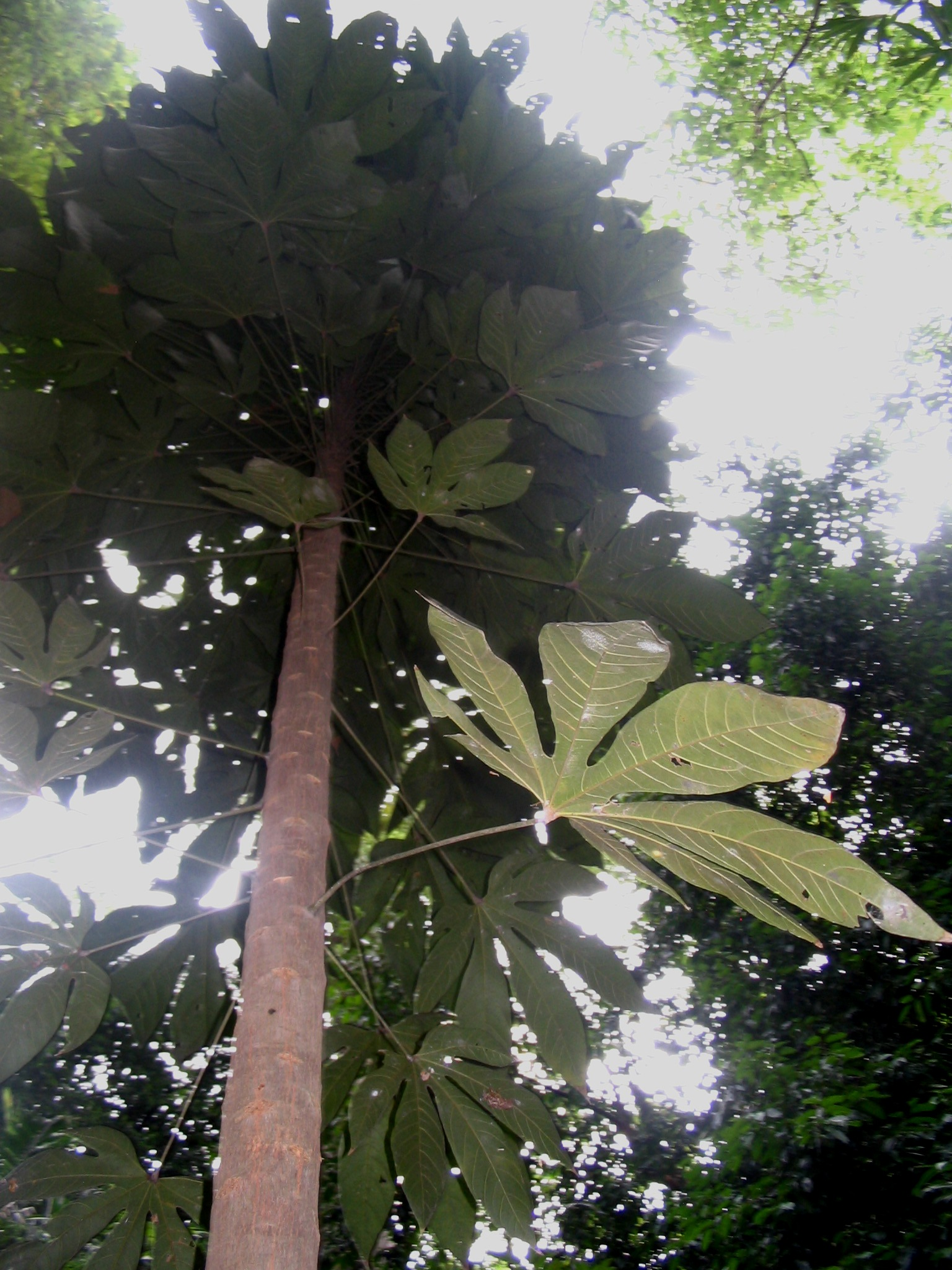 Scaphium longiflorum - Bikit Nanas National Forest reserve - Kuala Lumpur - Malaisie